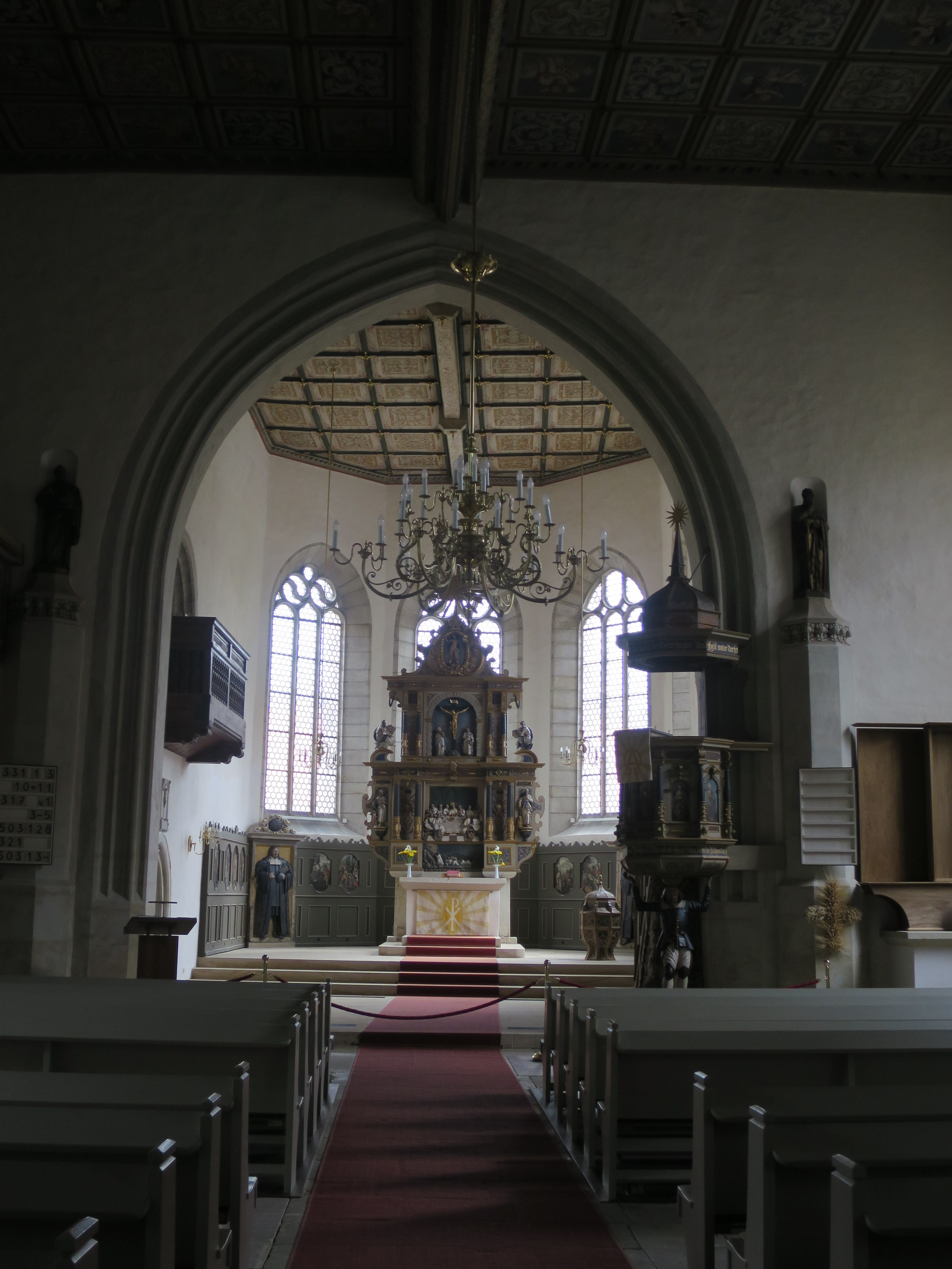 Innenraum der Kirche St. Wolfgang in Glashütte